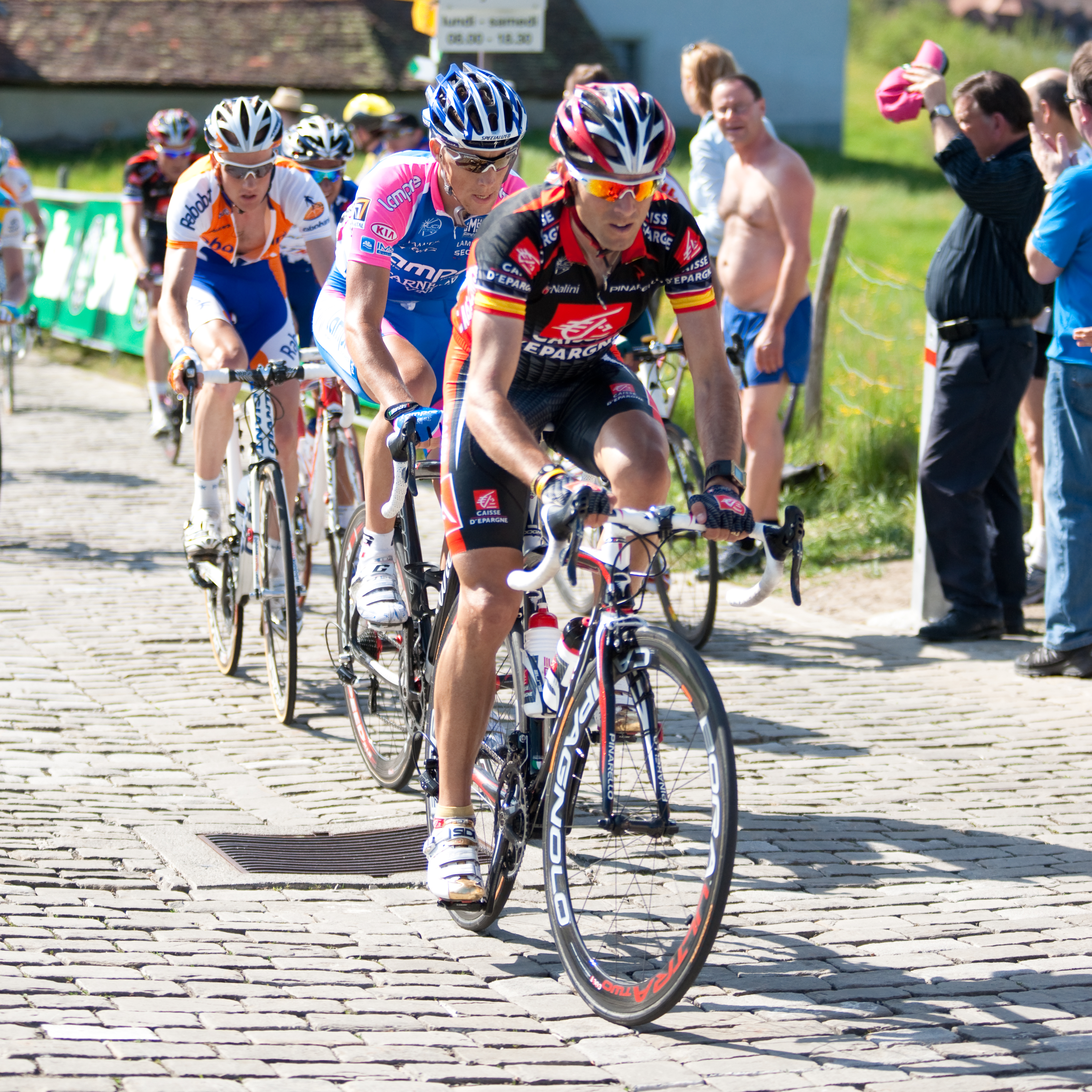 Alejandro Valverde lors de la seconde étape du Tour de Romandie 2010. Montée de la Lorette, second passage.